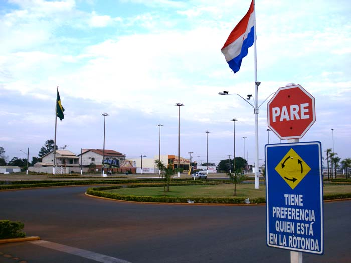 Границата между Парагвай и Бразилия.